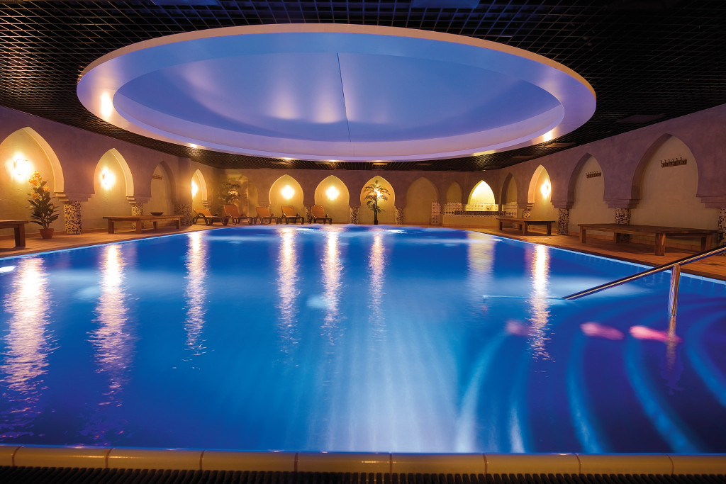 Spa & Wellness -osaston mineraalivesiallas.